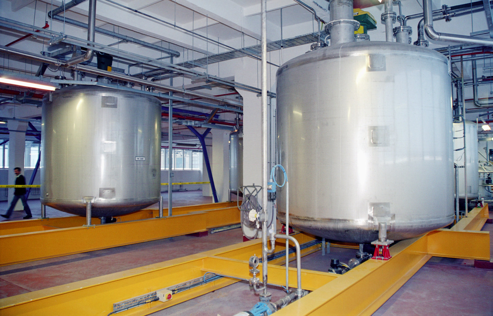 Фотохимическое производство компании «Кодак». Ёмкости для приготовления фотохимических растворов установлены на жёлтых рельсах. «ТК 200» это технологический номер ёмкости. Переславль, технопарк «Славич», корпус 102А.